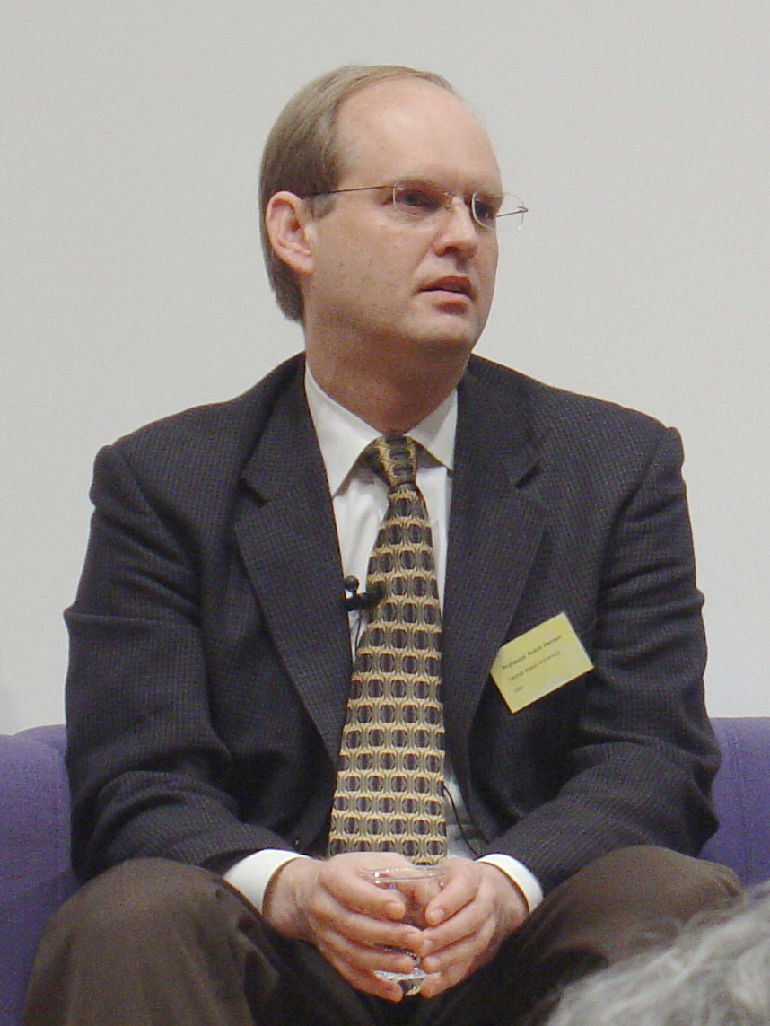 Robin Hanson